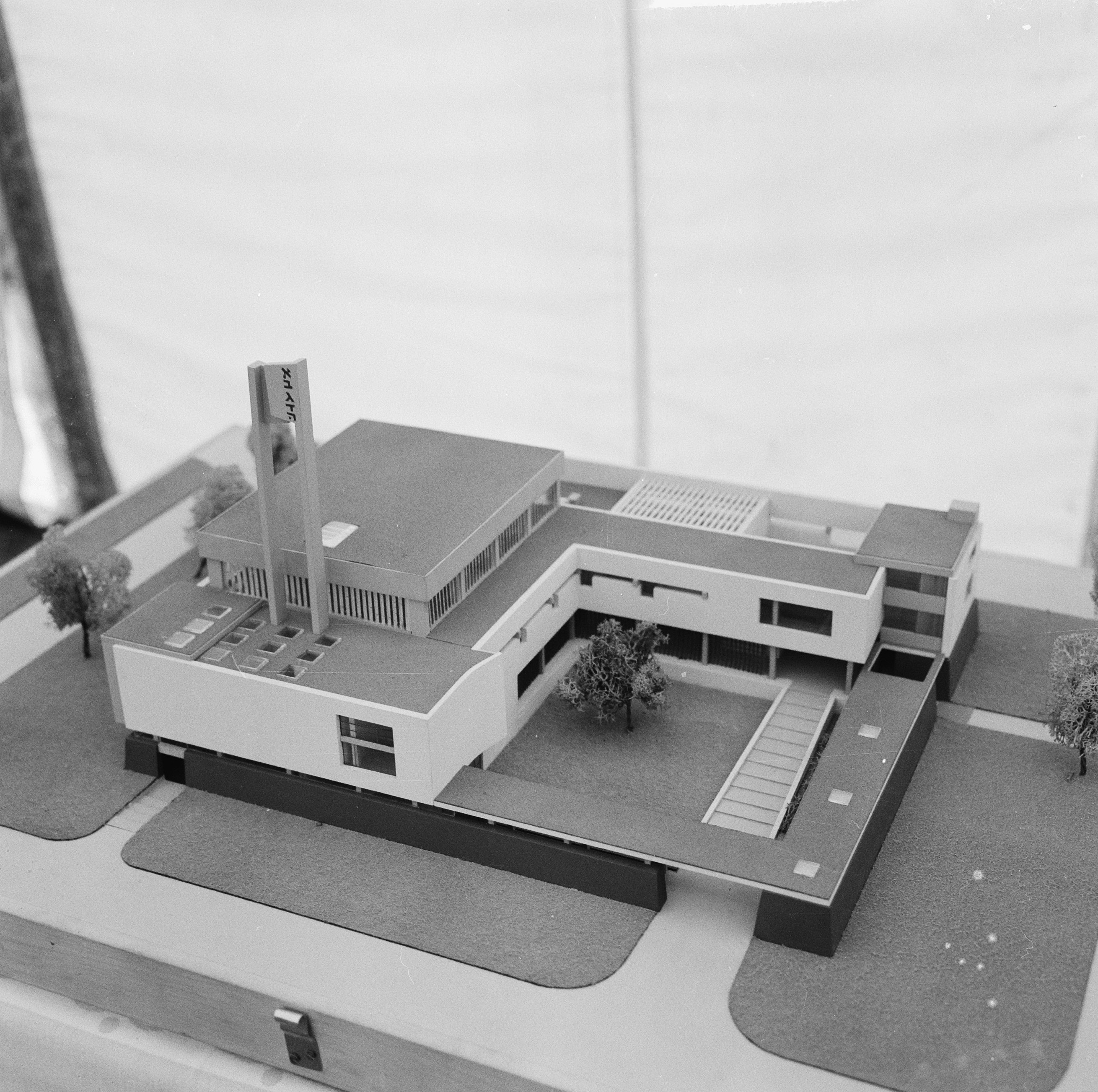 Collectie / Archief : Fotocollectie Anefo Reportage / Serie : [ onbekend ] Beschrijving : Wethouder Elsenburg eerste paal geslagen voor de Liberaal Joodse Gemeenschap aan de Europaboulevard, maquette Liberaal Joodse Gemeenschap Datum : 1 juni 1964 Trefwoorden : maquettes Fotograaf : Nijs, Jac. de / Anefo Auteursrechthebbende : Nationaal Archief Materiaalsoort : Negatief (zwart/wit) Nummer archiefinventaris : bekijk toegang 2.24.01.03 Bestanddeelnummer : 916-4972